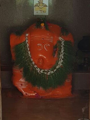 वीरकर गणपती फोटो